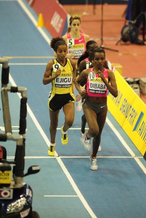 Ejigu, Dibaba, U.K Athletics.AVIVA GRAND PRIX.Birmingham